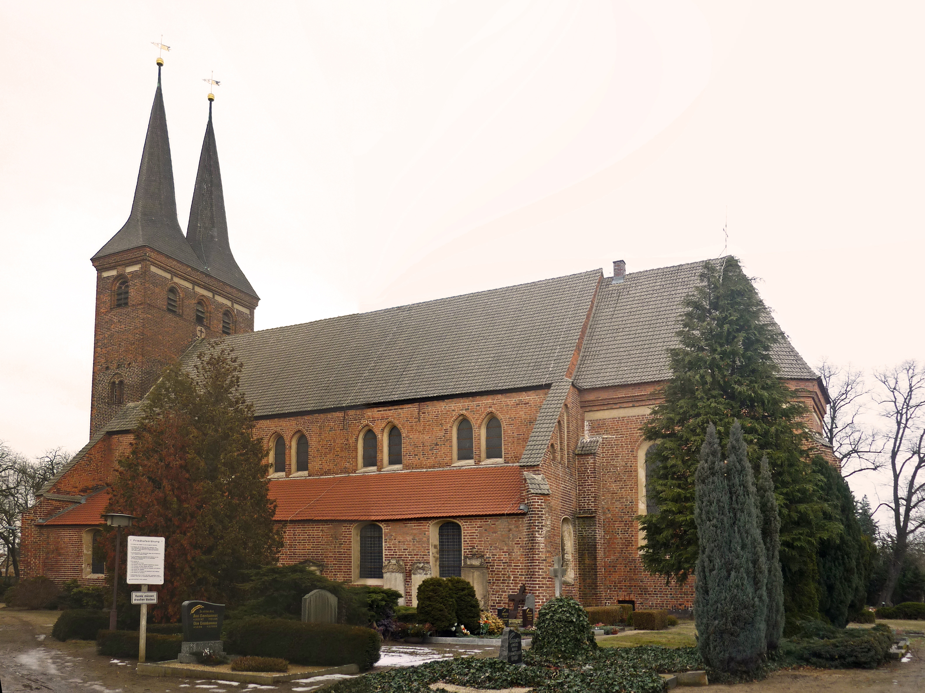 Stadtpfarrkirche von Doberlug-Kirchhain in Kirchhain NL, Kirchstraße